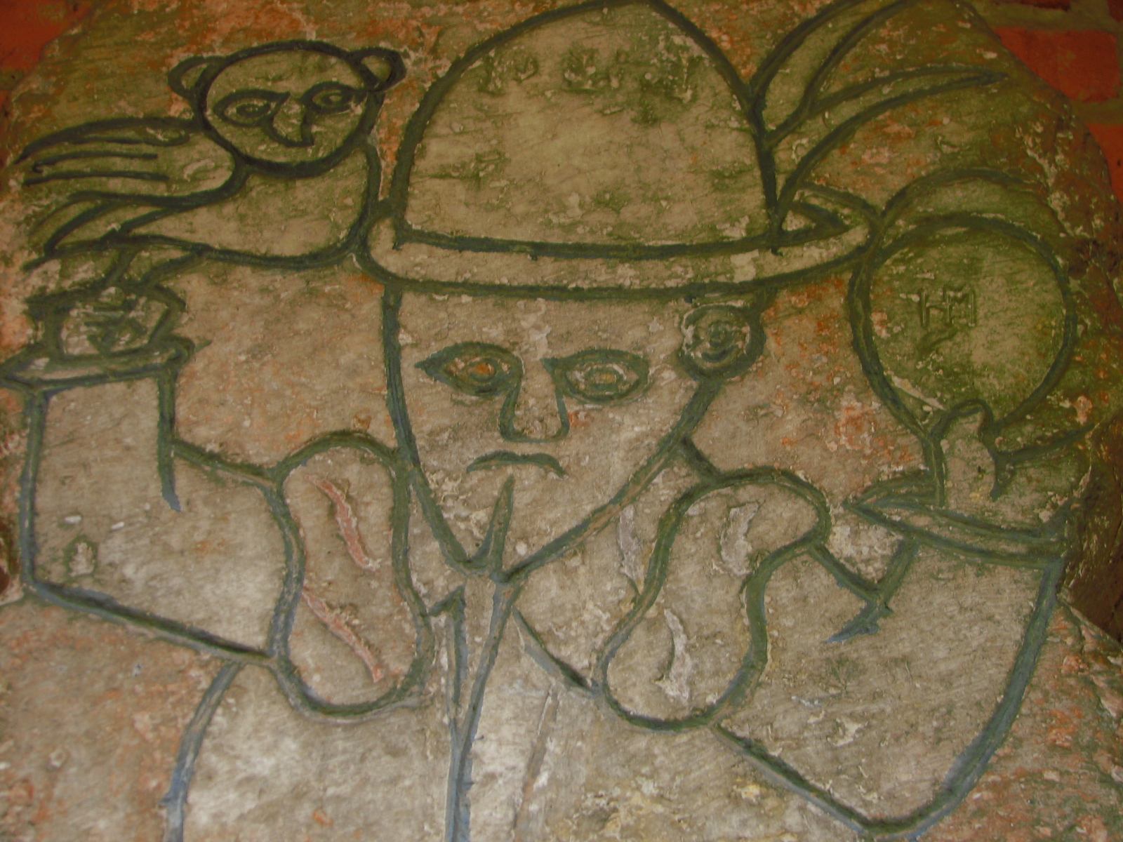 „Eulenspiegel Gedenkstein“ an der Kirche Sankt Nicolai in Mölln.